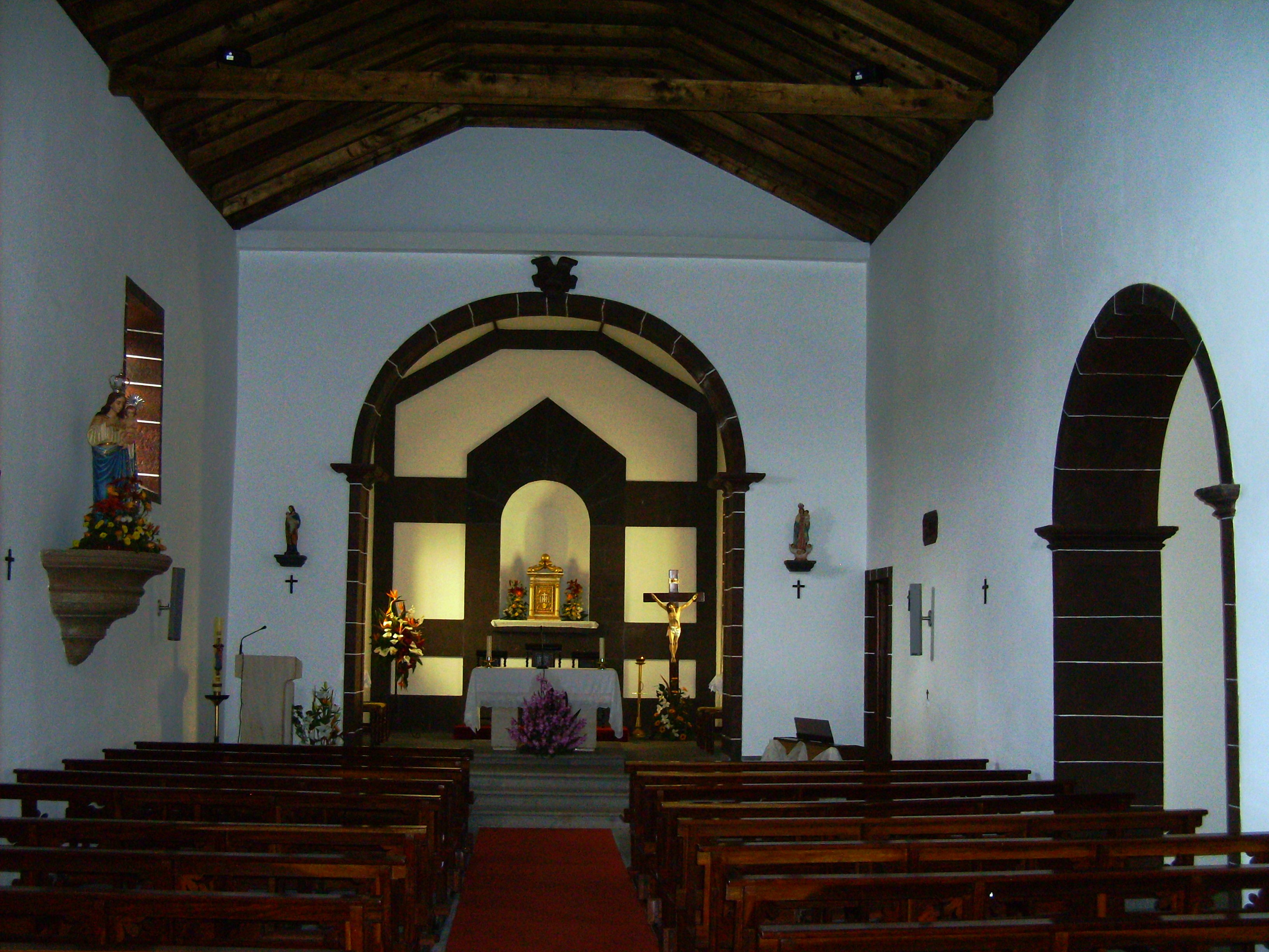 Igreja de Nossa Senhora do Bom Despacho (Almagreira), Ilha de Santa Maria (Açores), Portugal.